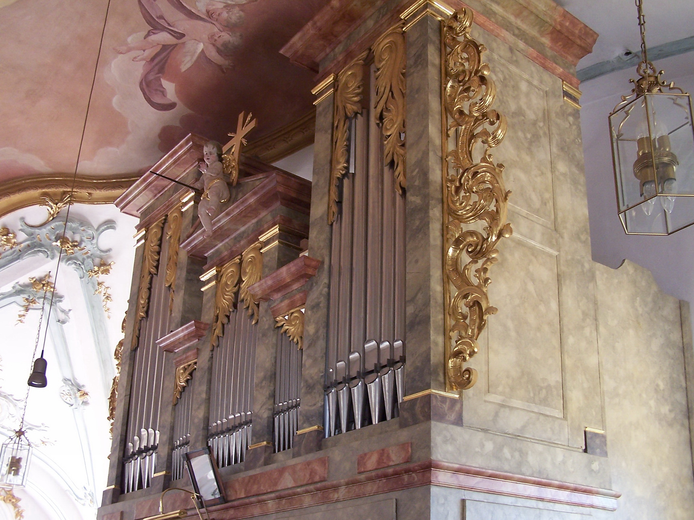 Geiselhöring, Hadersbach 28. Katholische Filialkirche Mariä Himmelfahrt. Die Orgel auf der Westempore mit seitlichen Akanthusranken aus dem Jahre 1843 stammt von Anton Ehrlich aus Straubing.